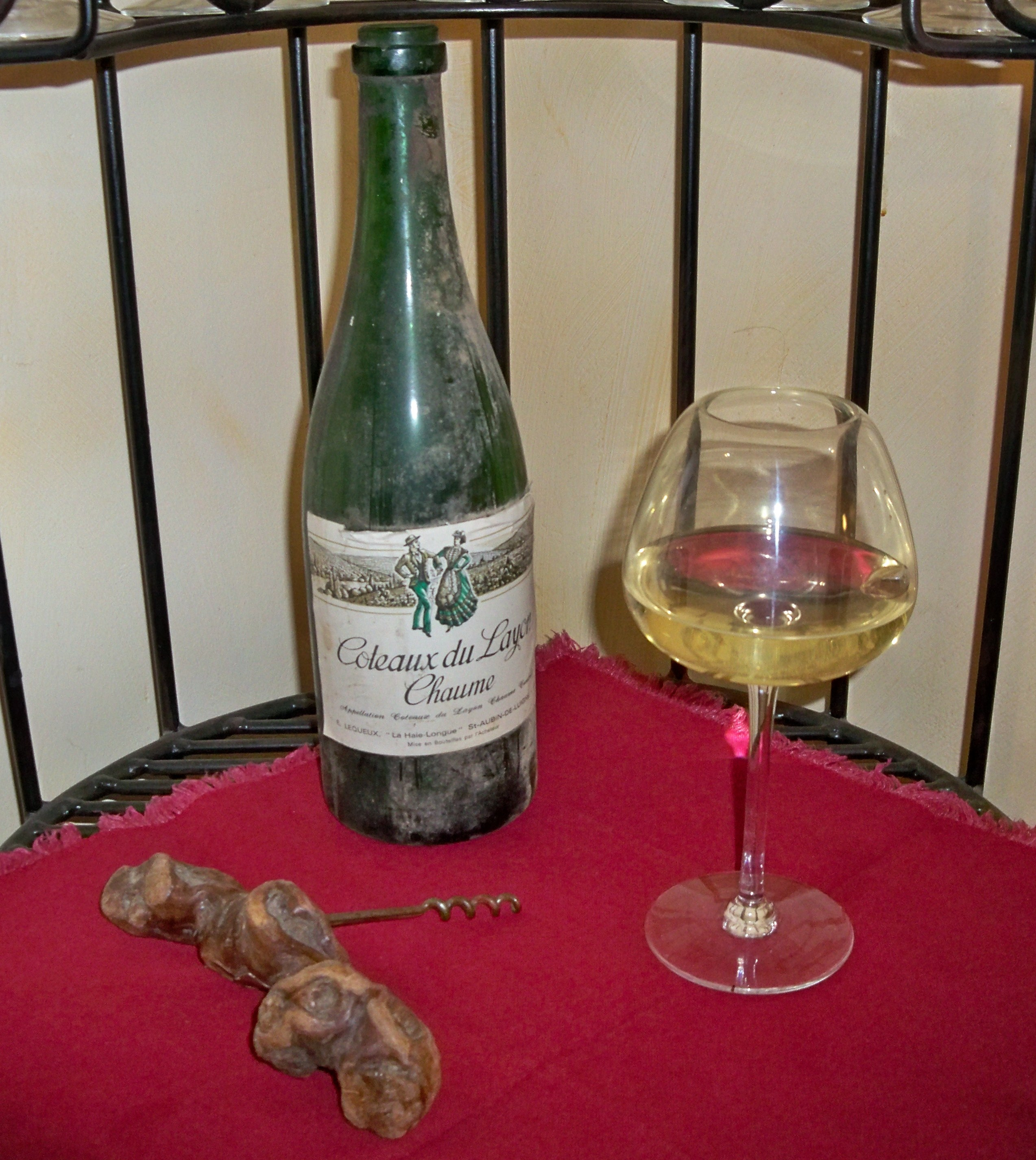 Bouteille de Côteaux de Layon-Chaume